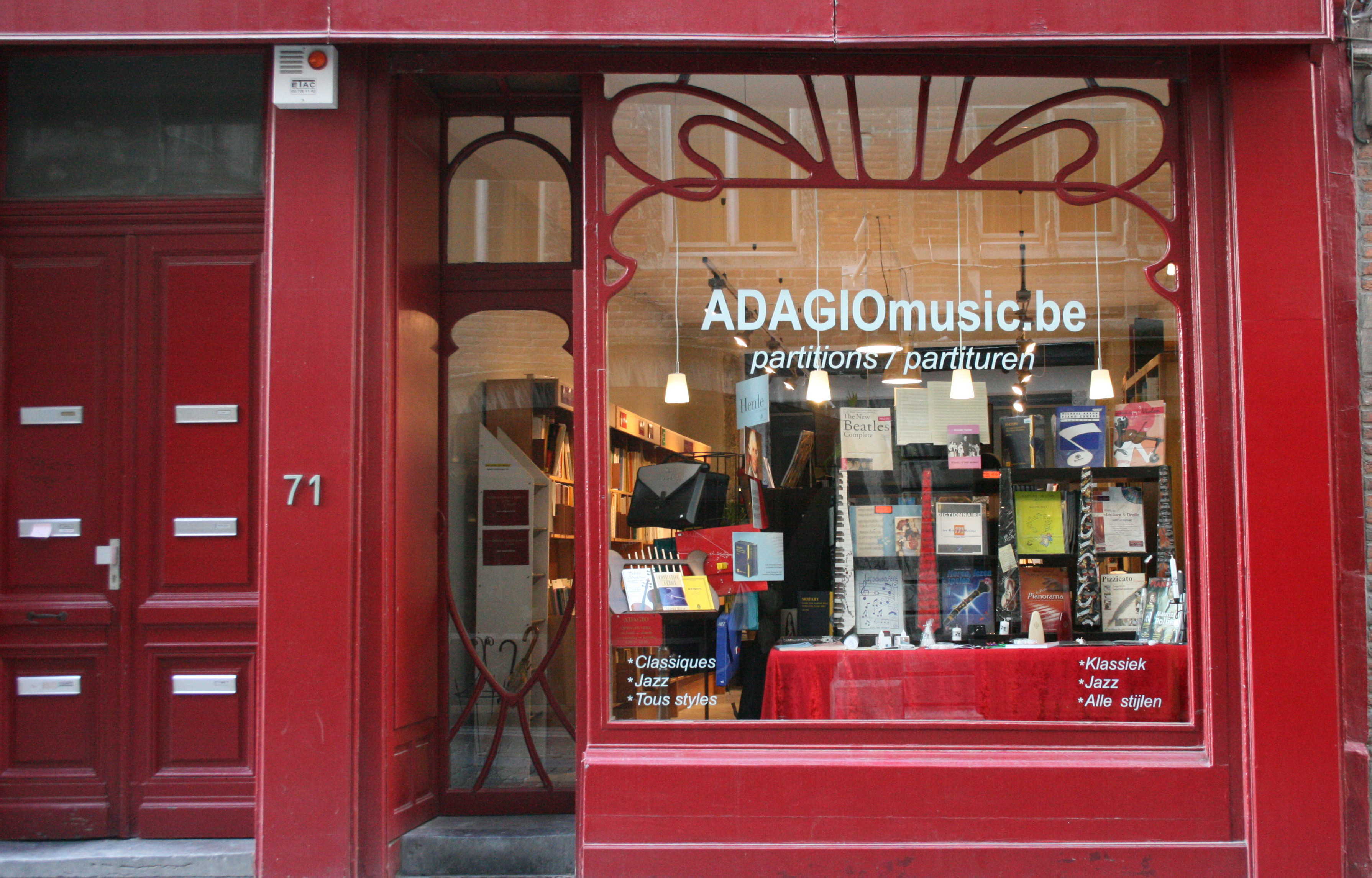 Rue des Éperonniers 71, Bruxelles, Belgique. Vitrine Art Nouveau